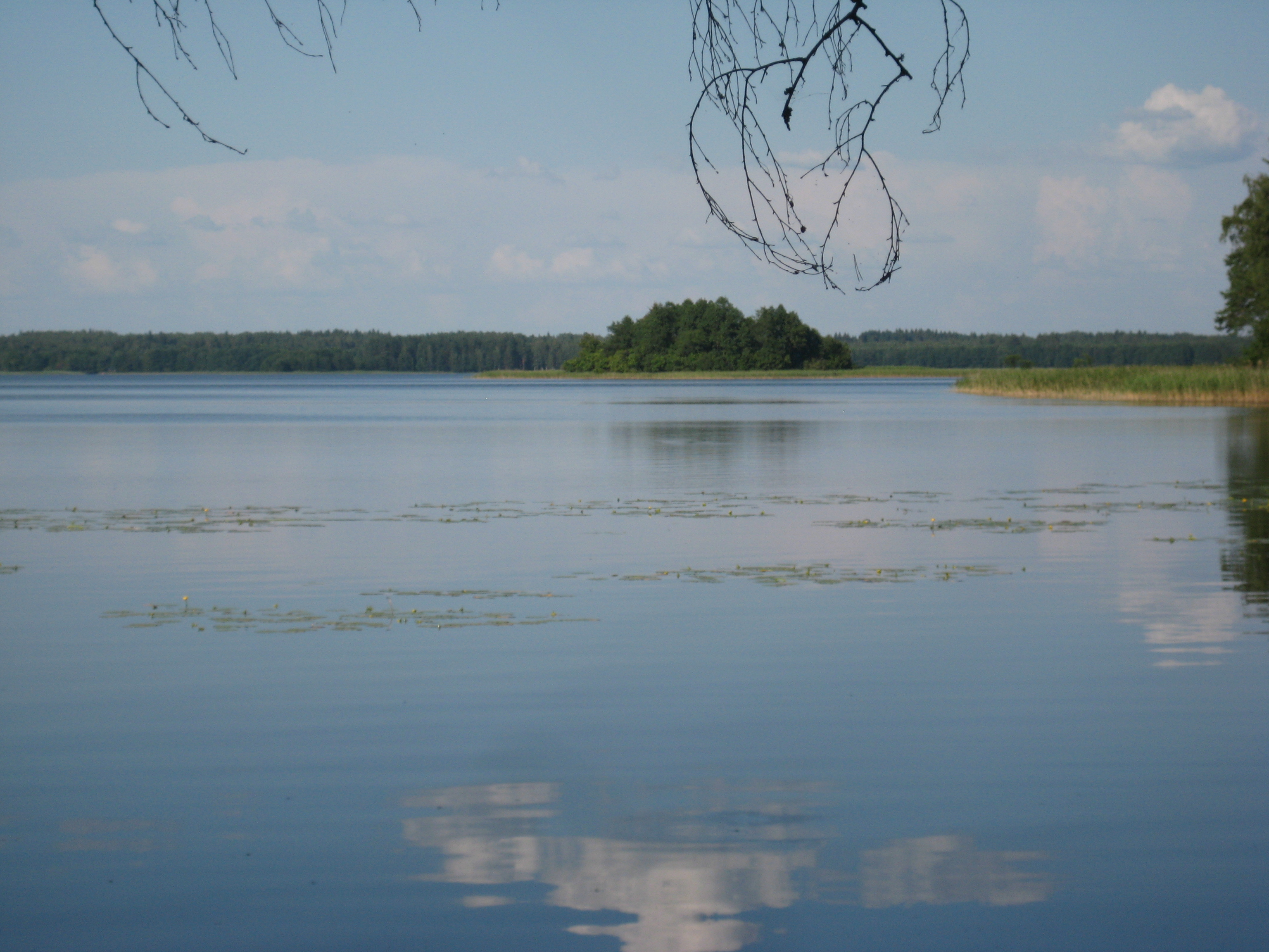 Salako sen., Lithuania